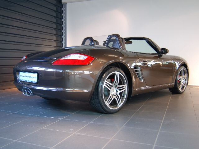 Porsche 987 Boxster